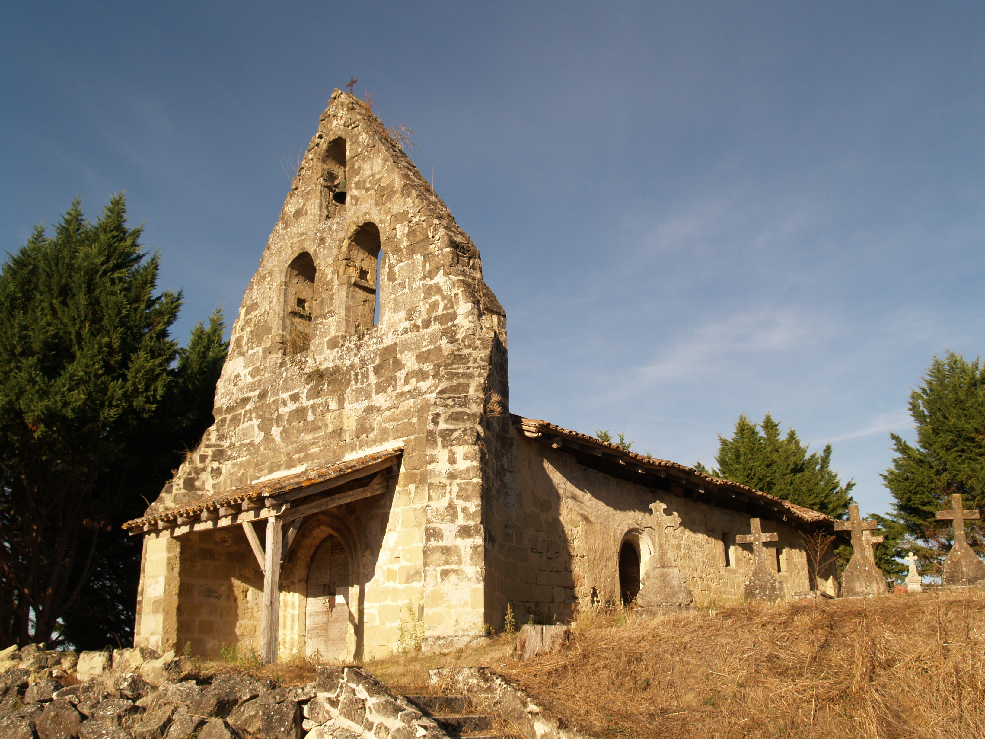 église Saint Pierre de Cabannes à Montastruc .